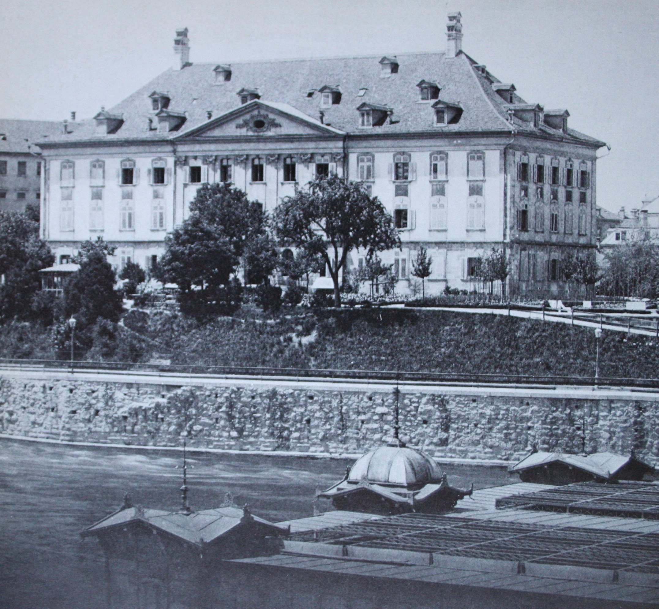 Das Waisenhaus von Zürich 1901